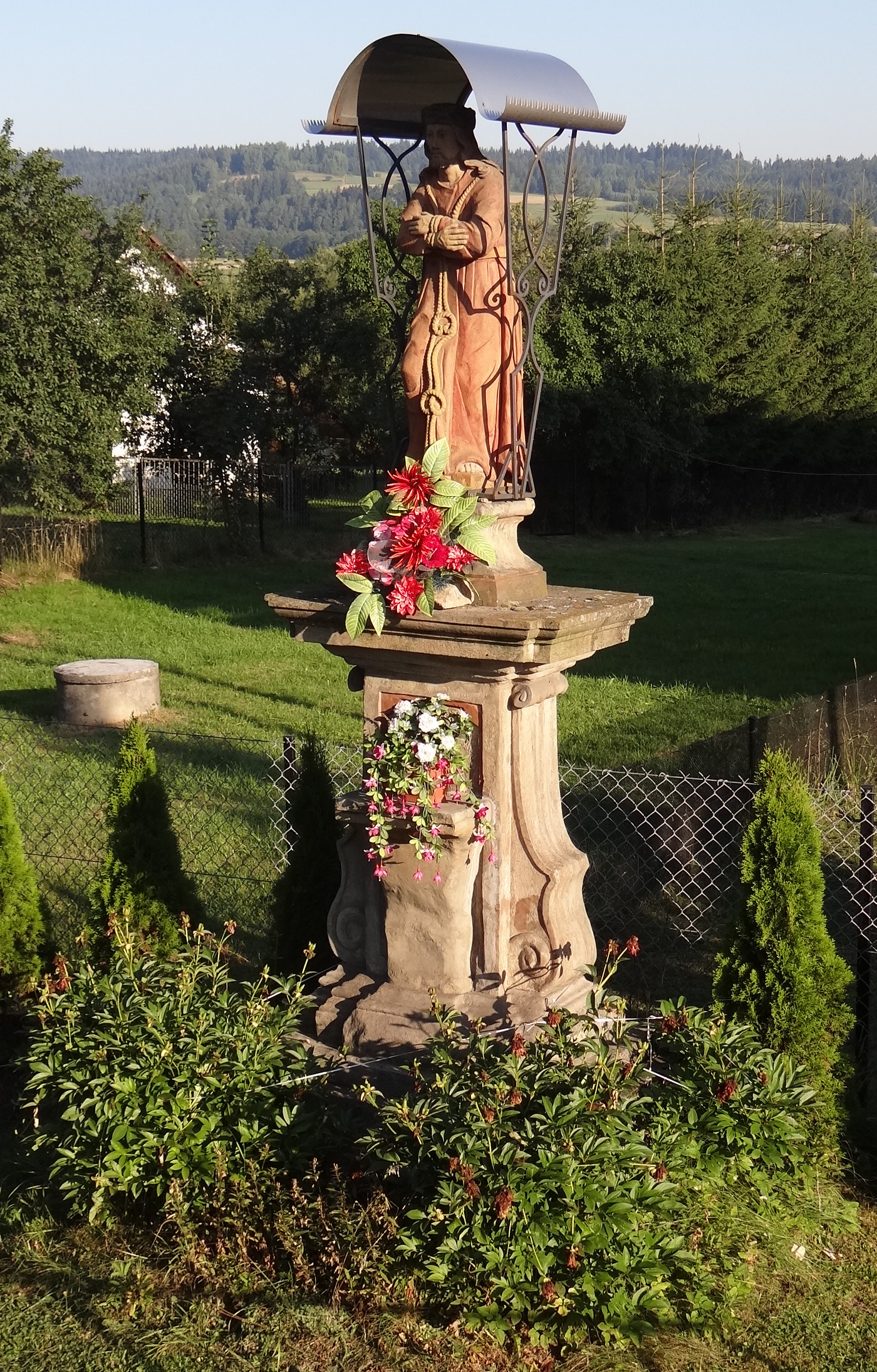 Figurka w Spytkowicach